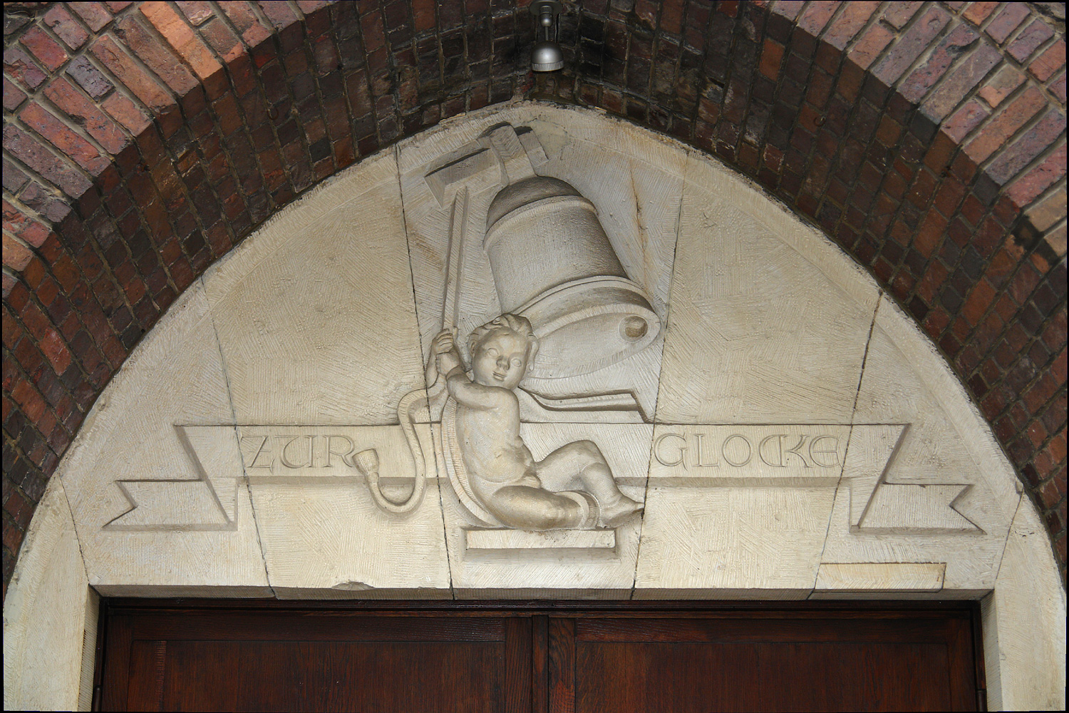 Konzerthaus „Die Glocke“ in Bremen. Figurenfries über einer Eingangstür